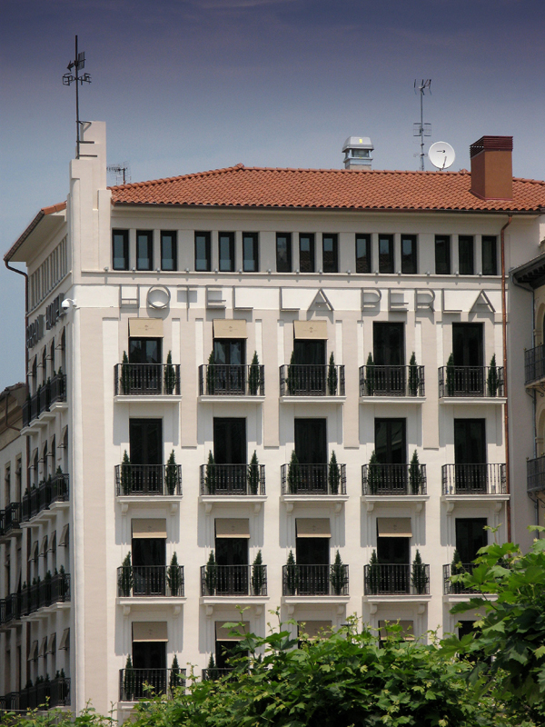 Photo: Baltasar G.S.